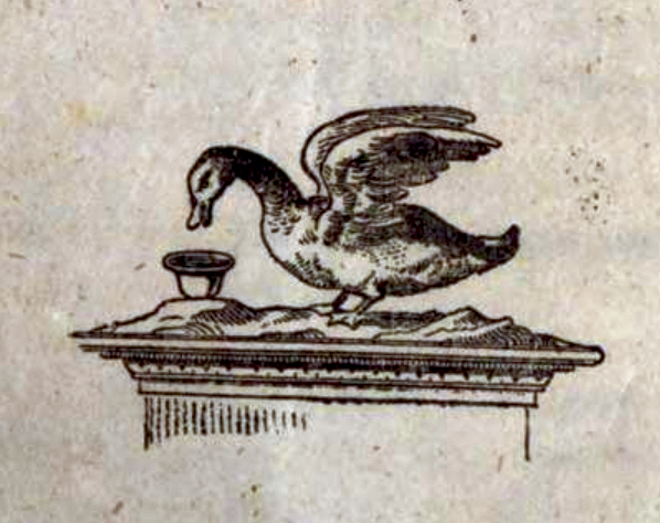 Illustration from cover page of Kurze Abhandlung über den merkwürdigsten Automaten (die mechanische Ente)